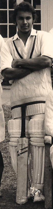 Ivan Johnson in 1972